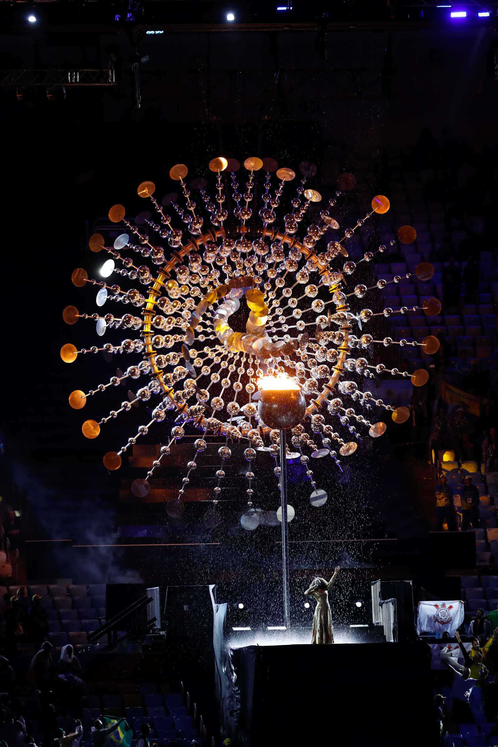 Rio de Janeiro - Cerimônia de encerramento dos Jogos Olímpicos Rio 2016, no Maracanã (Fernando Frazão/Agência Brasil)